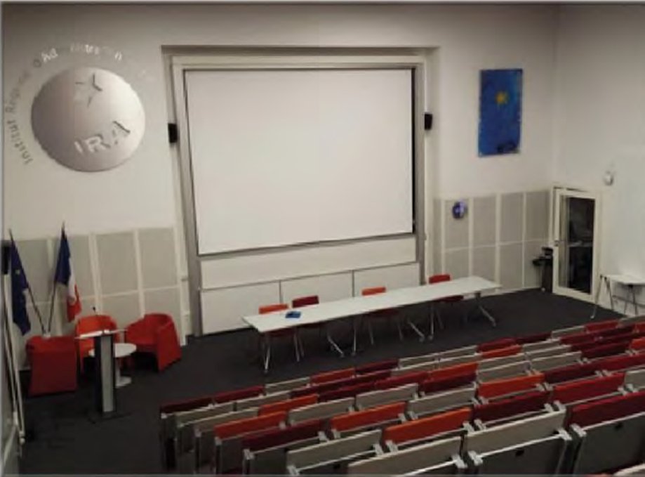 Vue Amphi